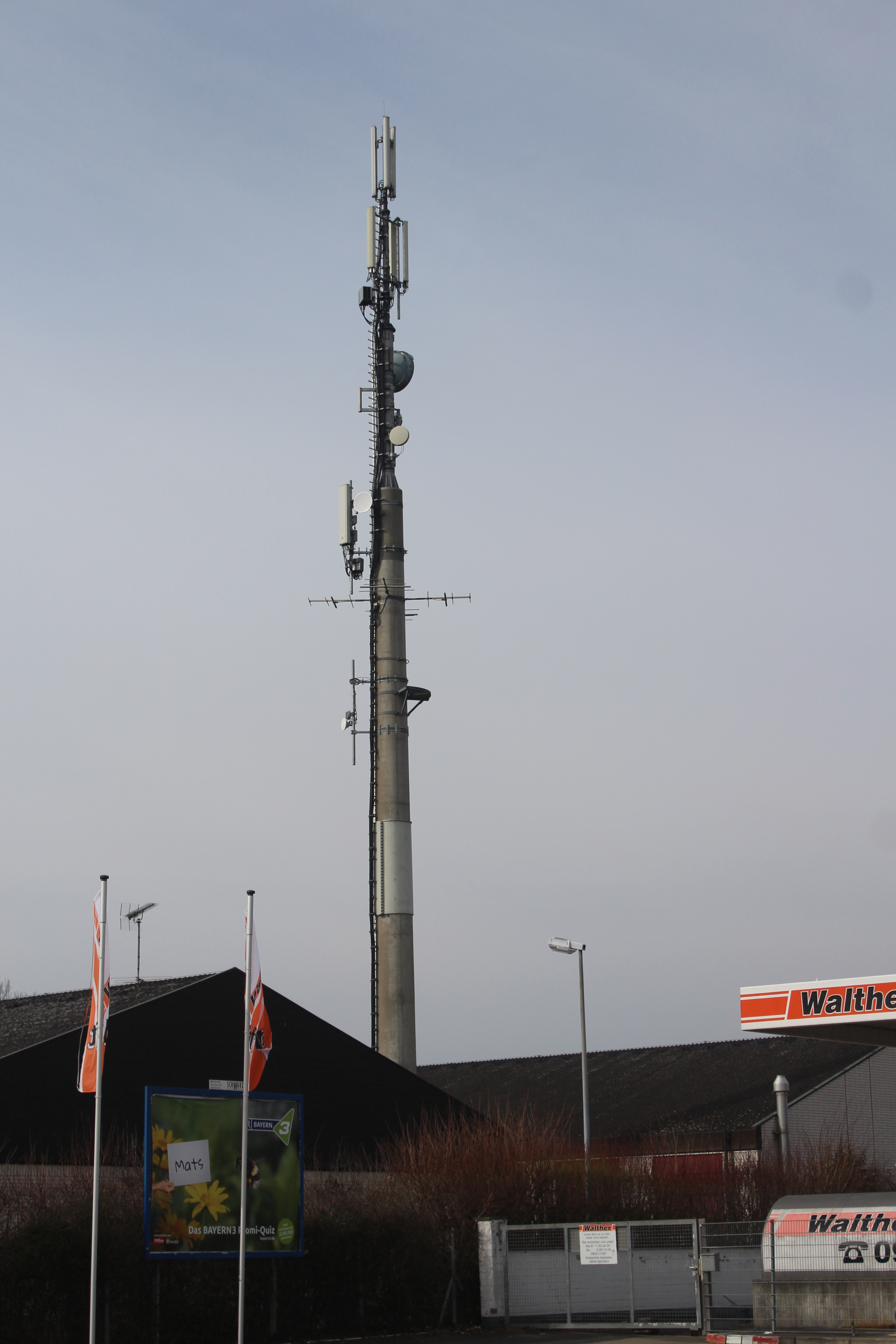 Sendeturm Hassfurt